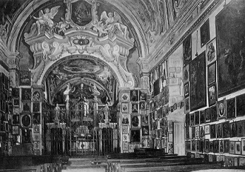 Interno della navata prima delle distruzioni durante i conflitti mondiali. Immagine approssimativamente degli anni 20 e tratta da una mia vecchia rivista in pessimo stato e ridotta a poche pagine. Da notare i numerosi ex voto alle pareti.